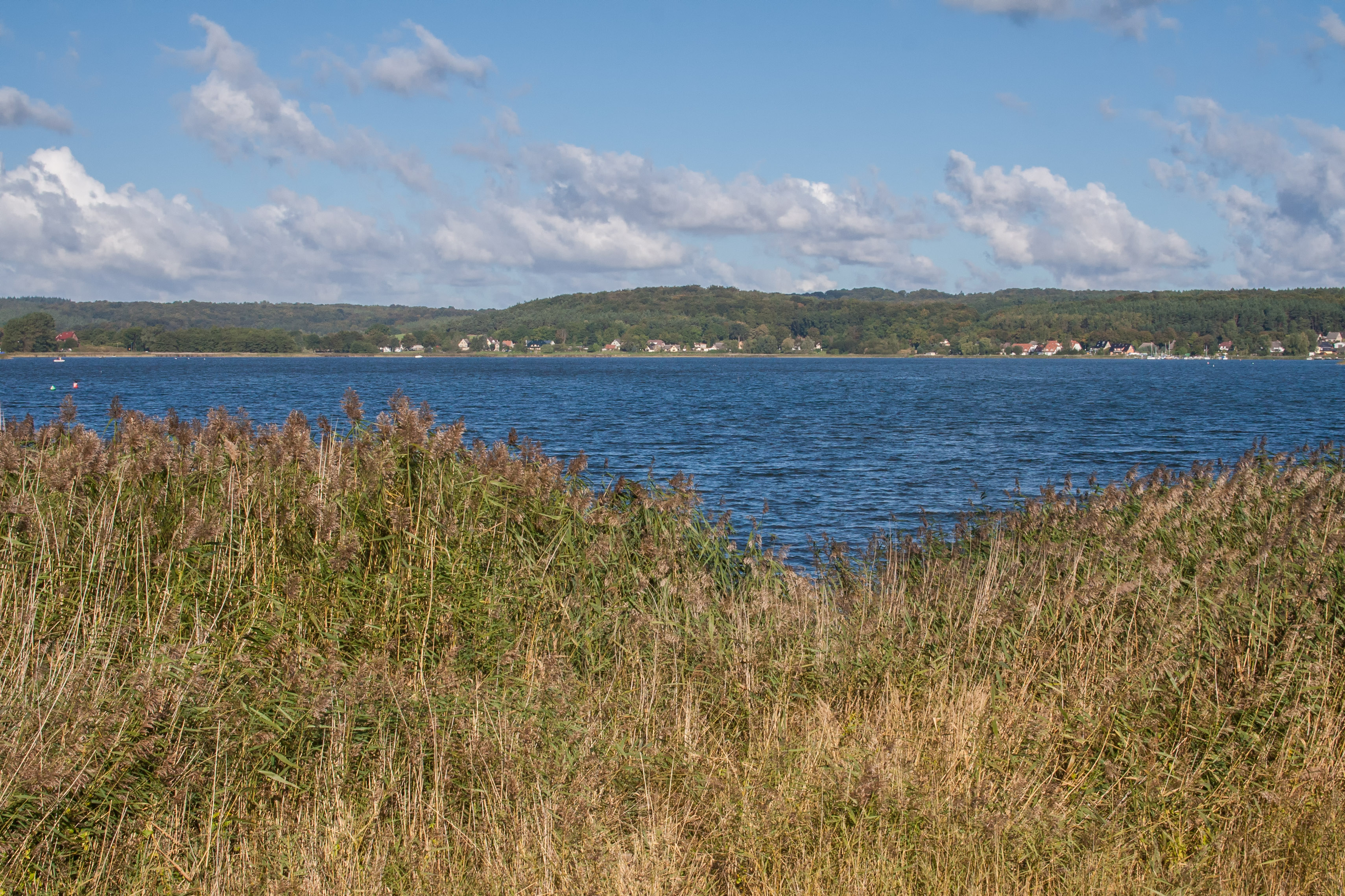 Rügen, Naturschutzgebiet, FFH-Gebiet, Landschaftsschutzgebiet, EU-Vogelschutzgebiet, Biosphärenreservat